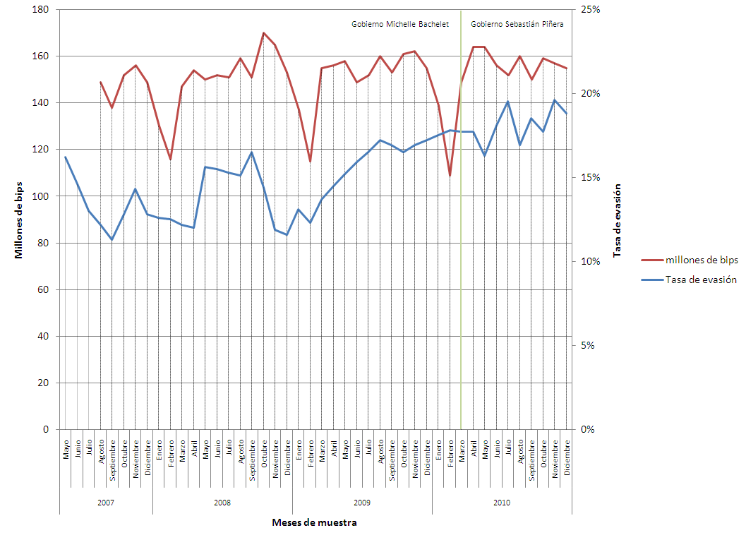 Gráfico comparativo entre las validaciones bips! y la tasa de evasión según y